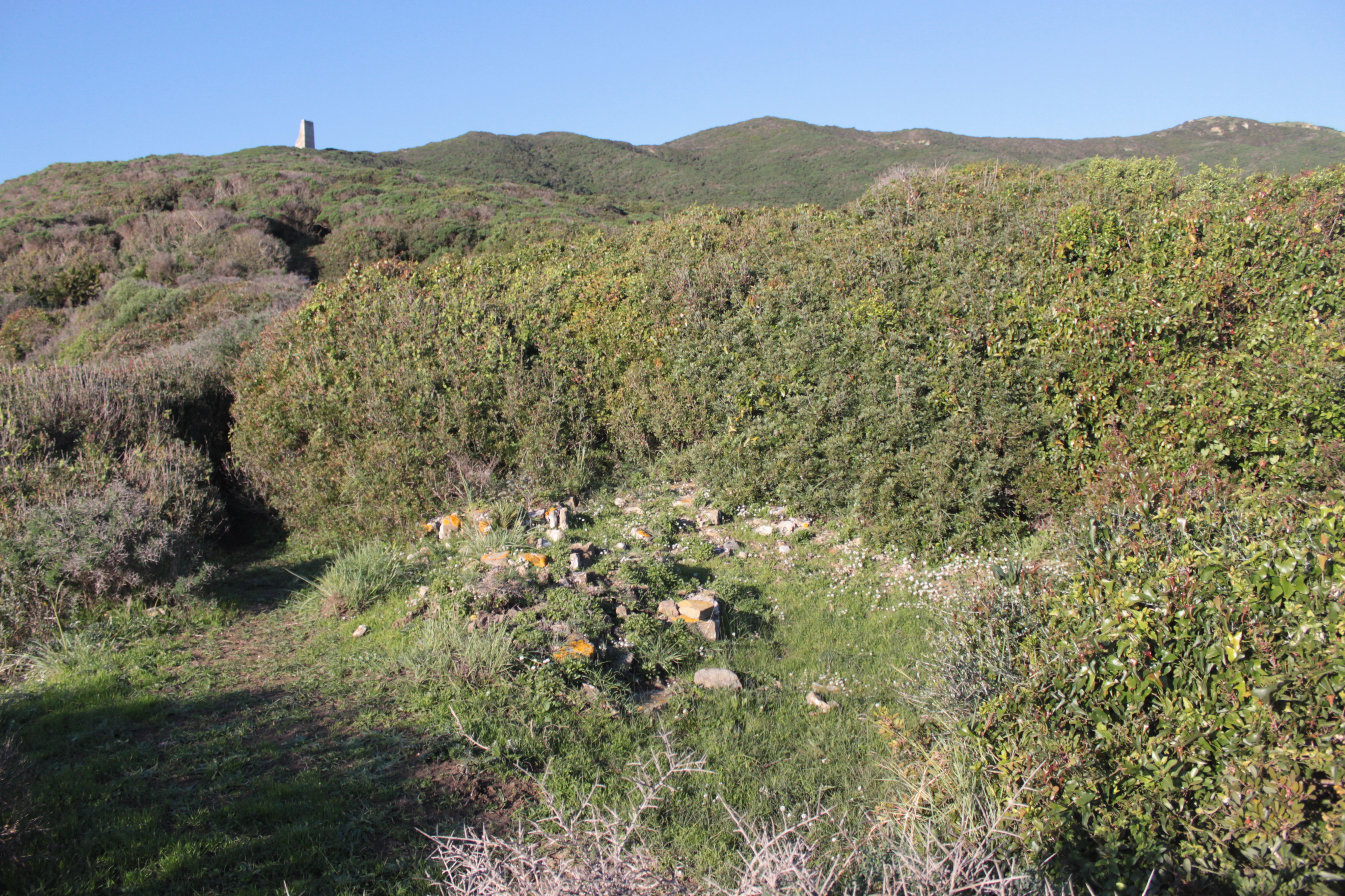 Restos del muro del parapeto del Fuerte de San Diego en la actualidad. Al fondo la torre del Fraile. Punta del Fraile, Algeciras, Andalucía, España.